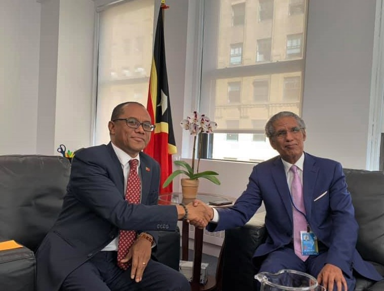 Dionísio Babo Soares und Mohamed Salem Ould Salem